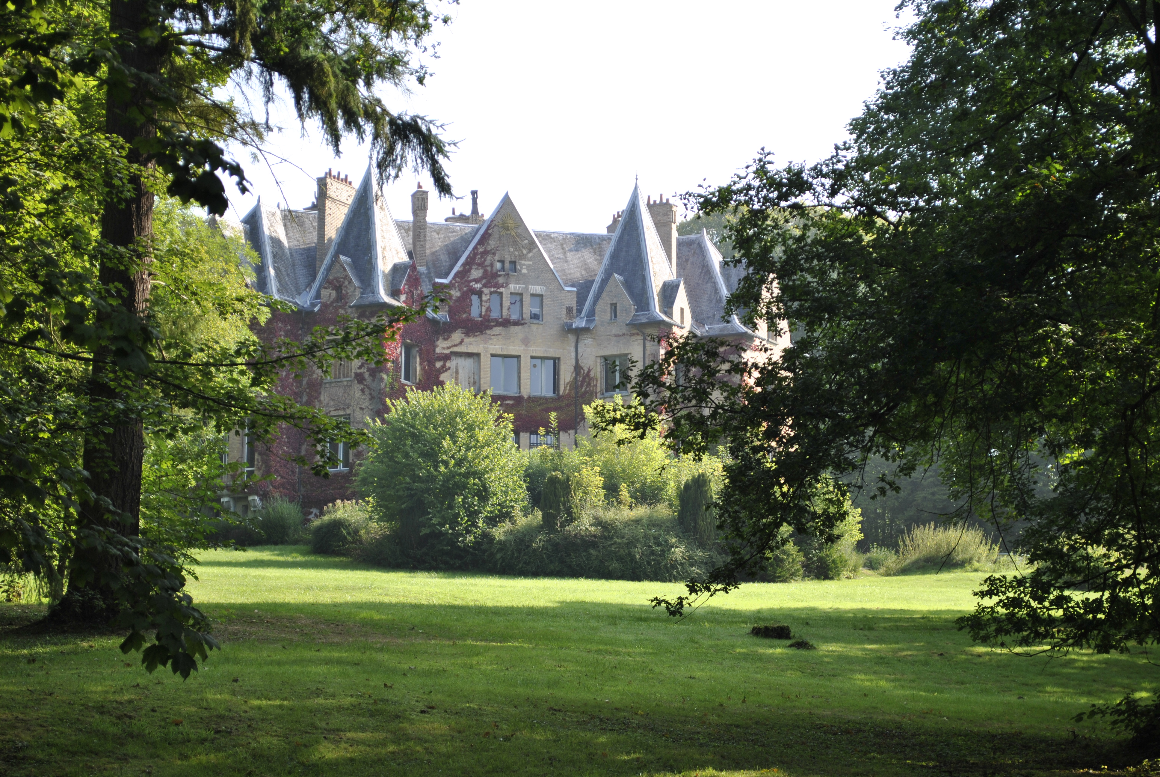 Le nouveau château des Chaînées reconstruit par Paul Robine (1872-1934). Façade principale sud-ouest vue du chemin forestier encadrant la propriété.